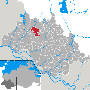 Wittenburg in Mecklenburg-Vorpommern - district Ludwigslust